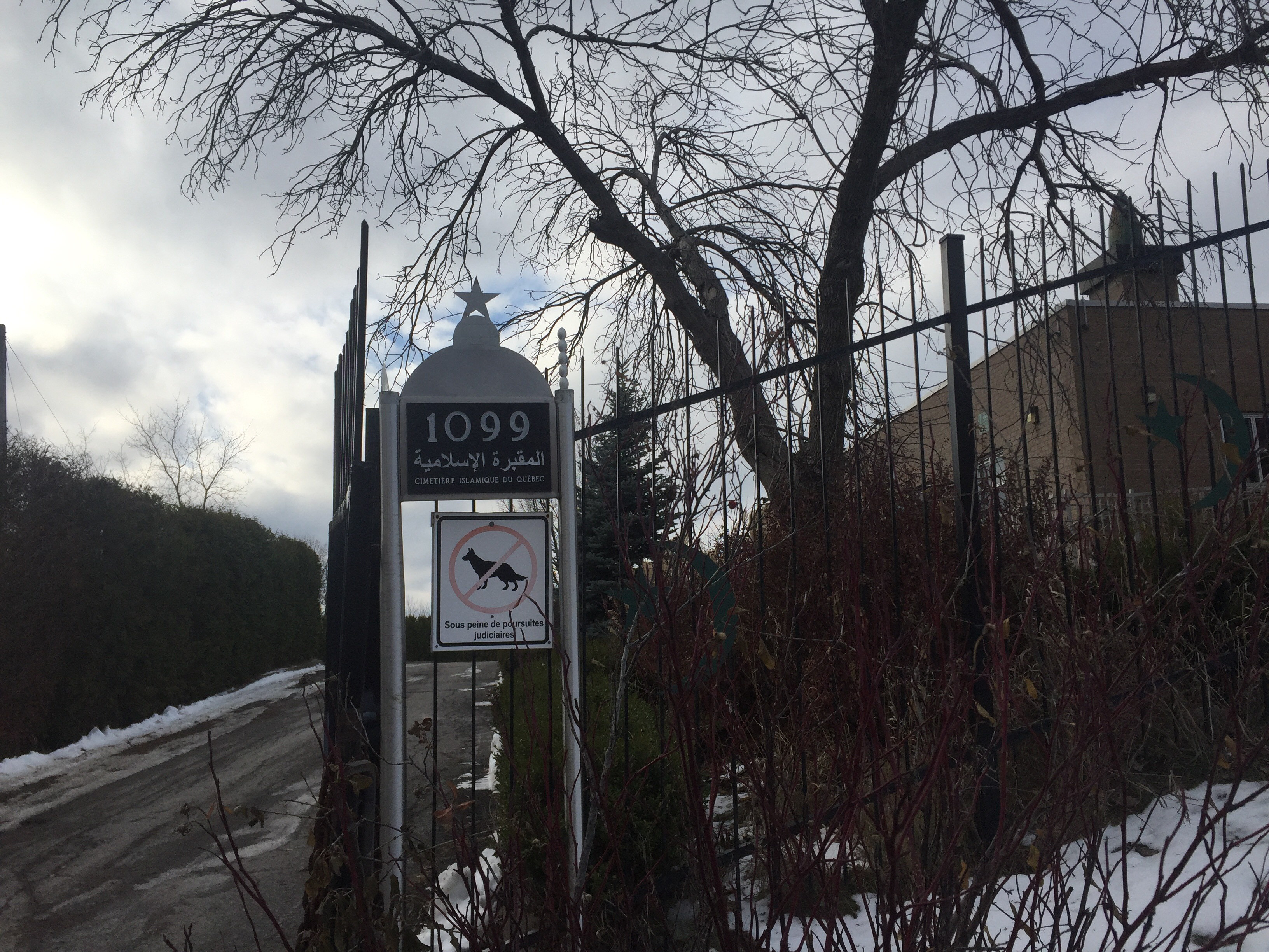 L'entrée du cimeterre islamique de Laval